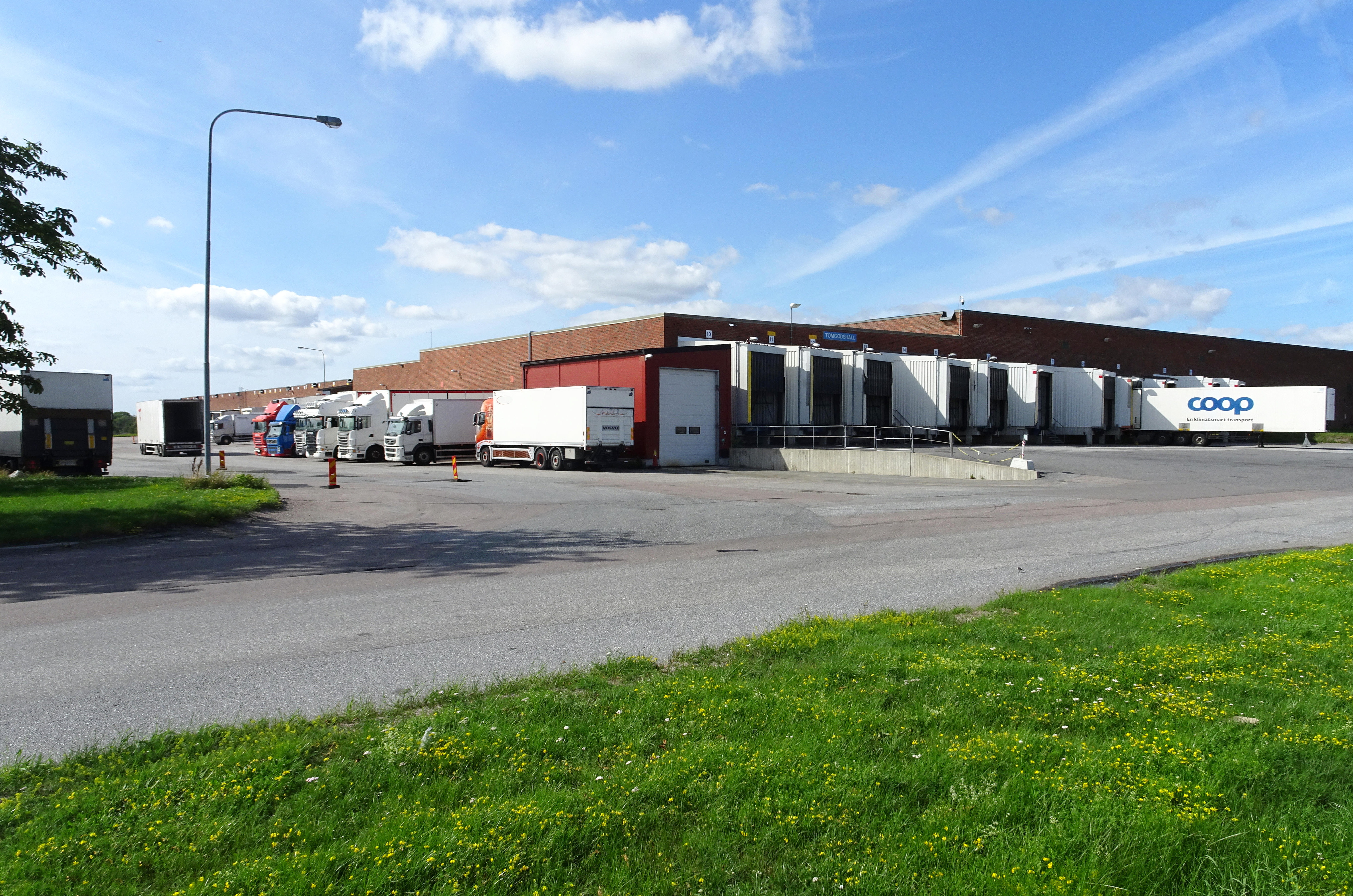 Coop Sverige Broterminalen (centrallager i Upplands- Bro)